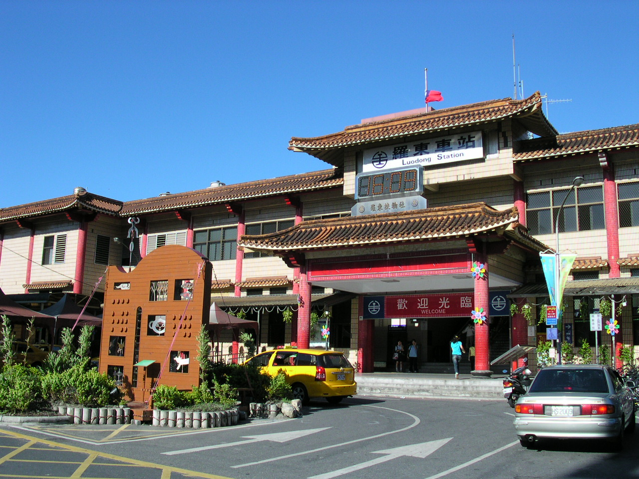 臺灣鐵路管理局宜蘭線羅東車站。